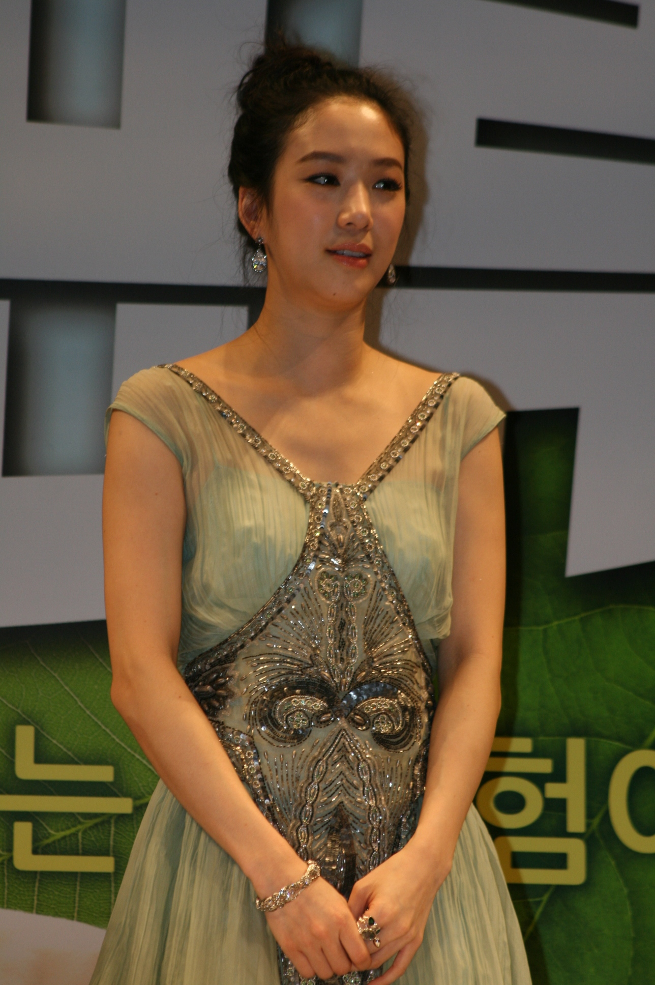 사진 046